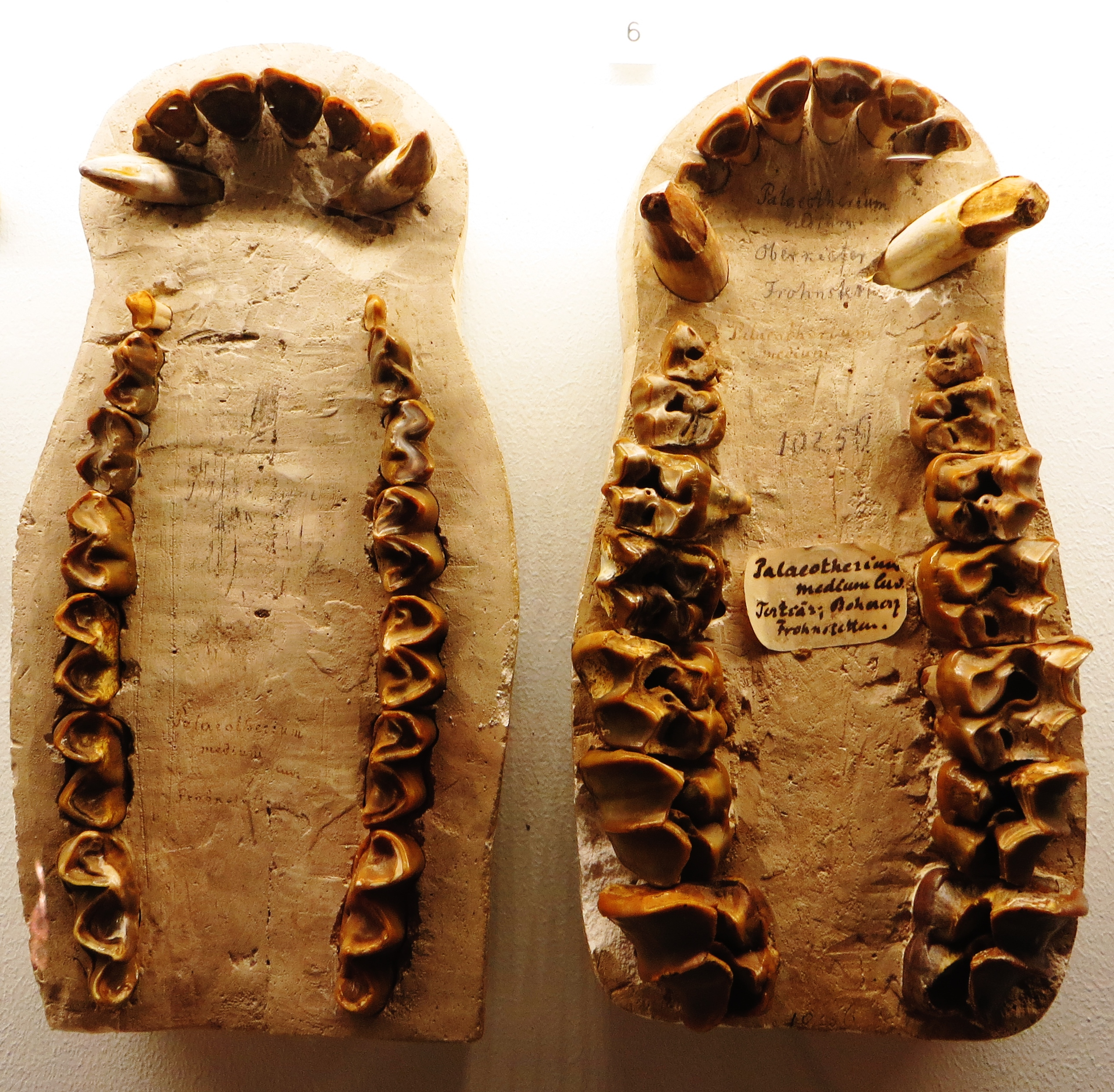 Fossil of Palaeotherium, an extinct mammal - Took the picture at Museum of Paleontology, Tuebingen